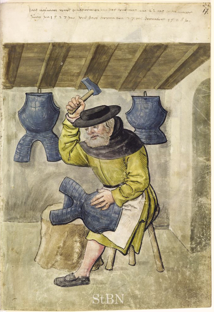 Transkription und weitere Informationen Jorg (Jörg; Georg) Hofman (Hofmann; Hoffmann), -- (Plattner; Harnischmacher)